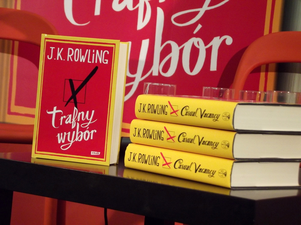 Zdjęcie zrobione podczas 16. Targów Książki w Krakowie.